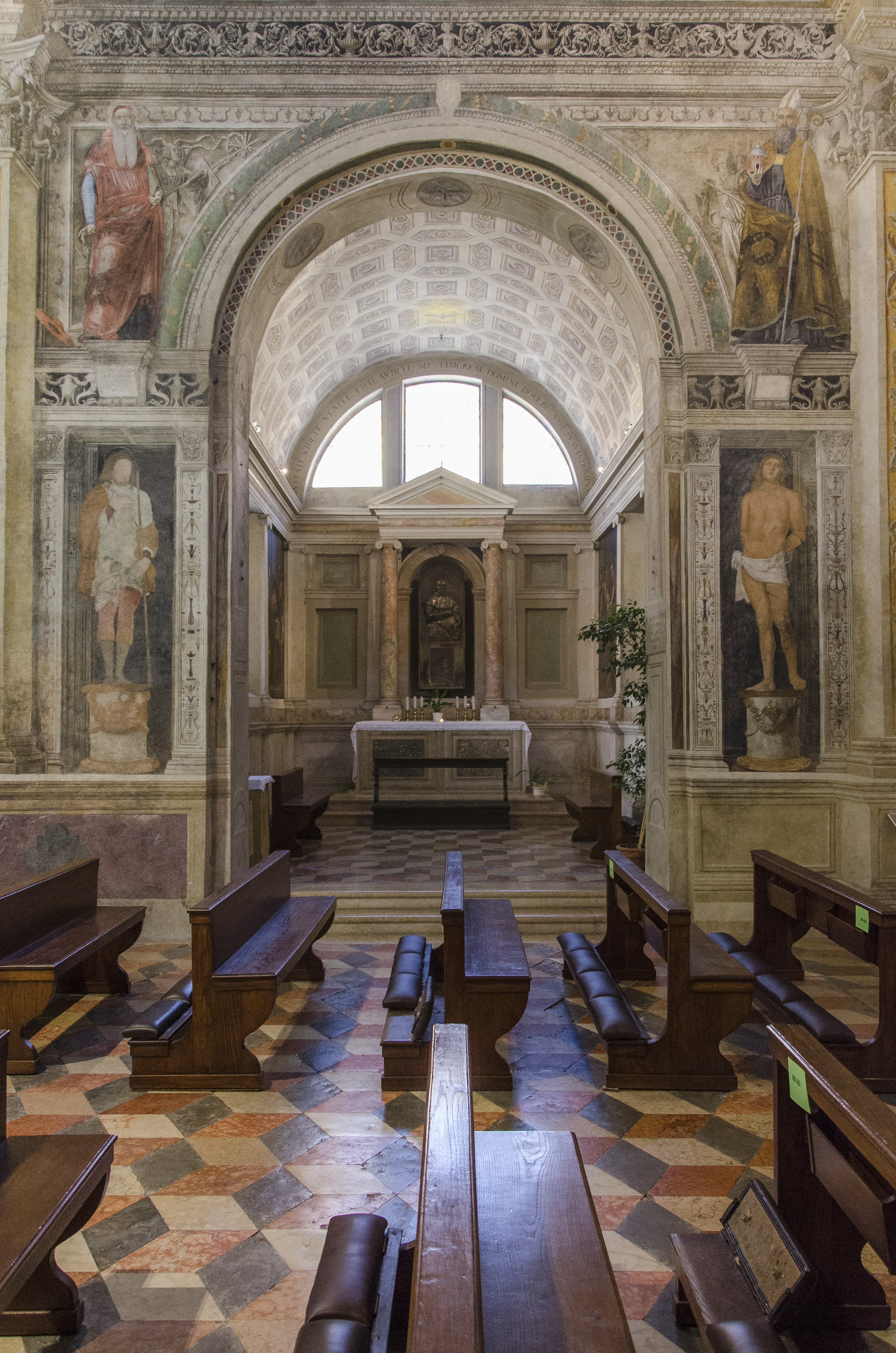 Chiesa dei Santi Nazaro e Celso a Verona. Interno, in stile rinascimentale.